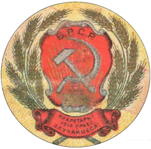 Дзяржаўны герб БССР, меркавана, эскіз Г. Змудзінскага